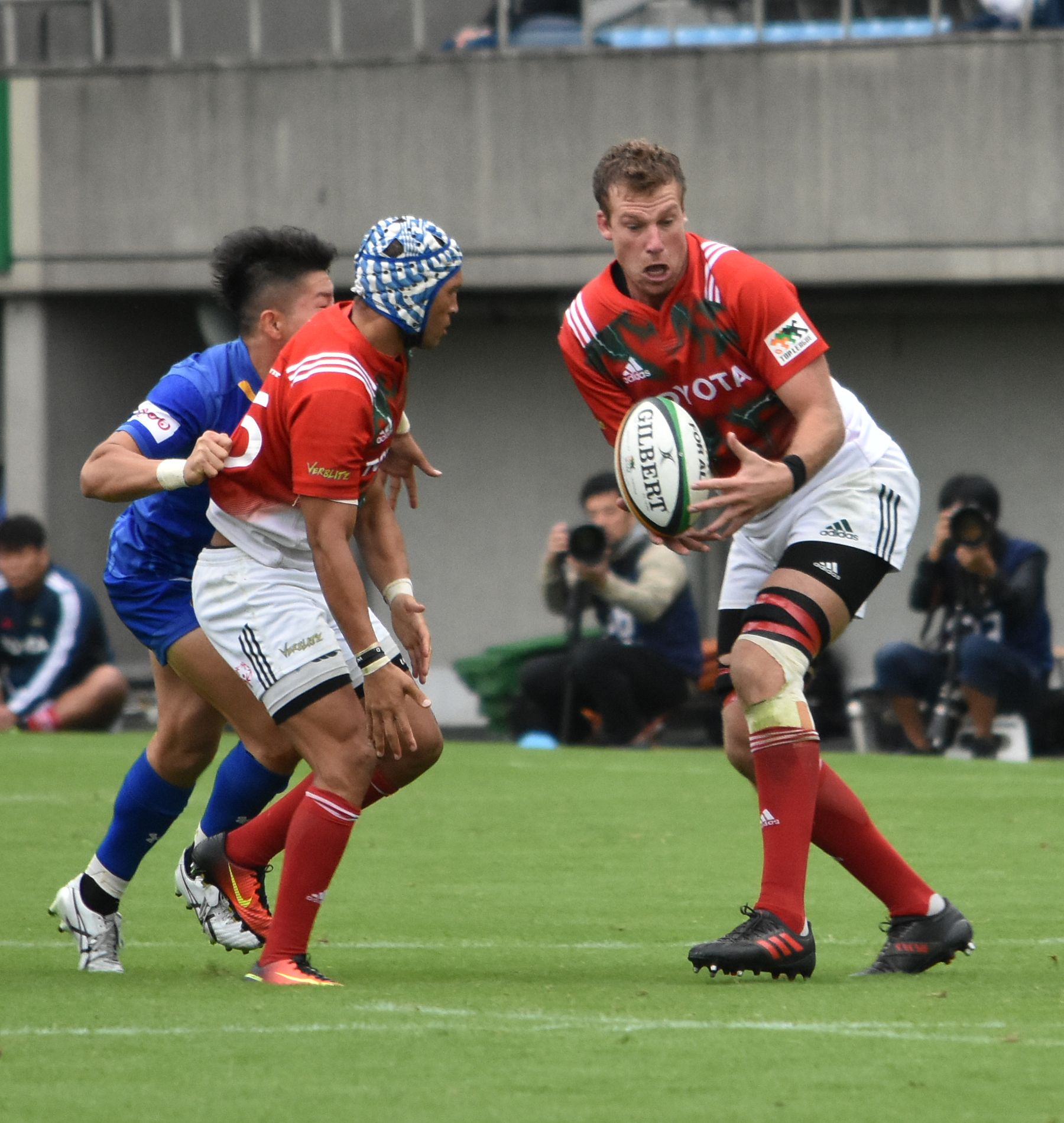 レニエル・ヒューゴ